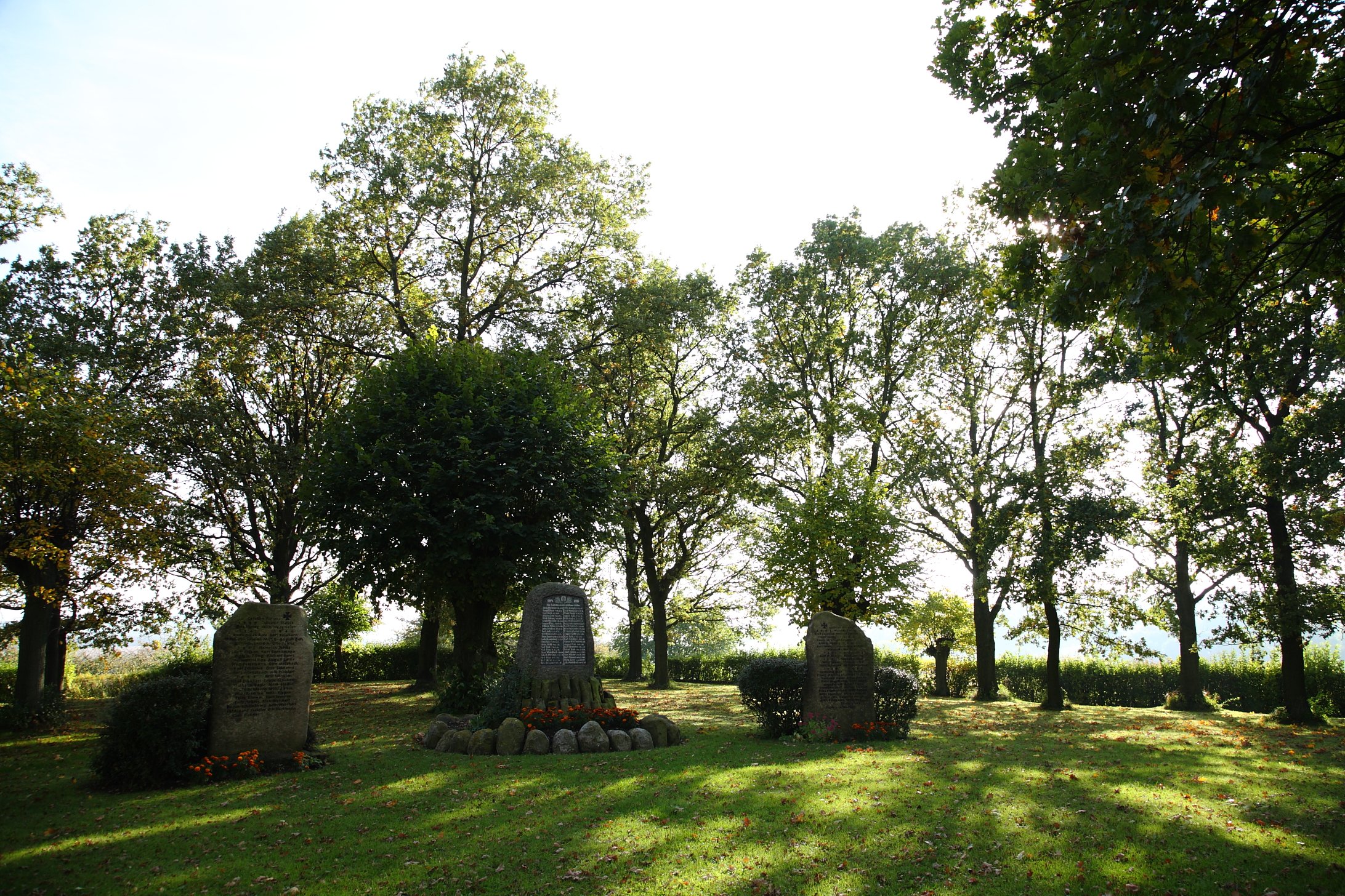 Der Ehrenhain in Jühnde - Mitgliedsgemeinde der Samtgemeinde Dransfeld.